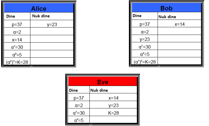 Shembull i shkëmbimit të çelësave përmes protokollit Diffie-Hellman